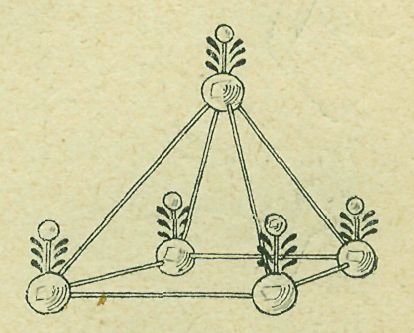 adventní/vánoční svícen